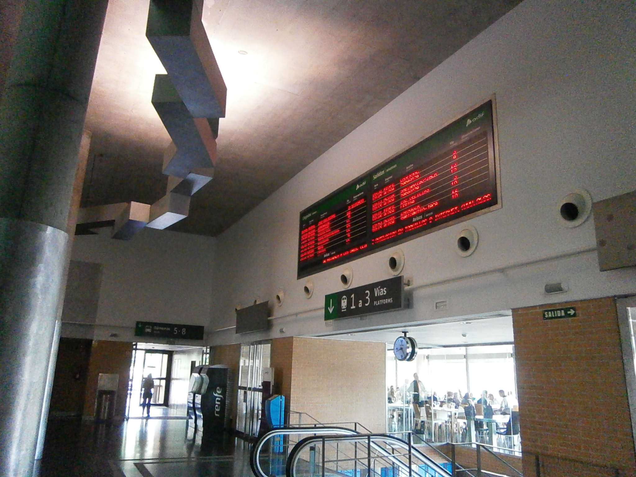 Vestíbulo de la estación